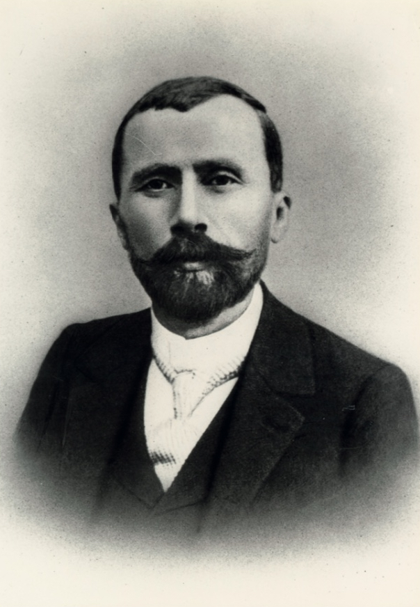 French meteorologist Léon Teisserenc de Bort (1855-1913)